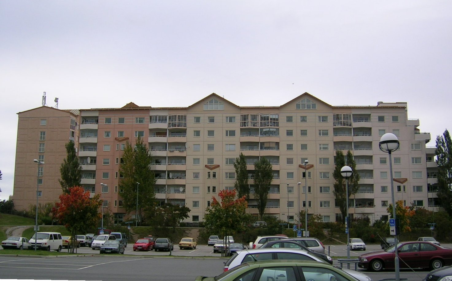 Norra kronans gata, Brandbergen Foto:Shrimp 11 september 2005 kl.16.29 (CEST)